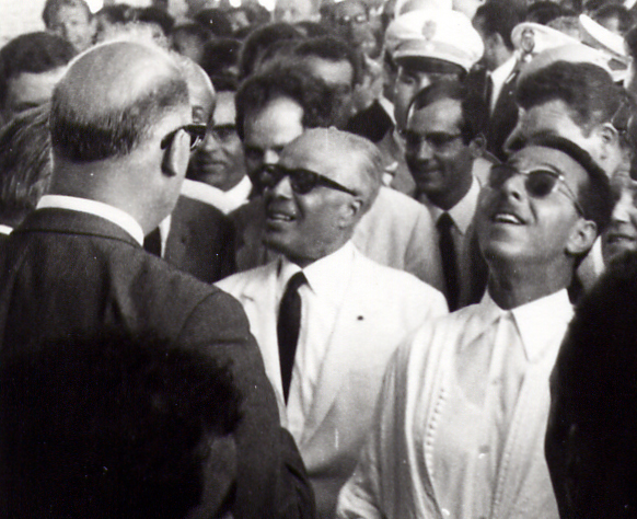 Bourguiba à Mahdia le 11 aout 1967